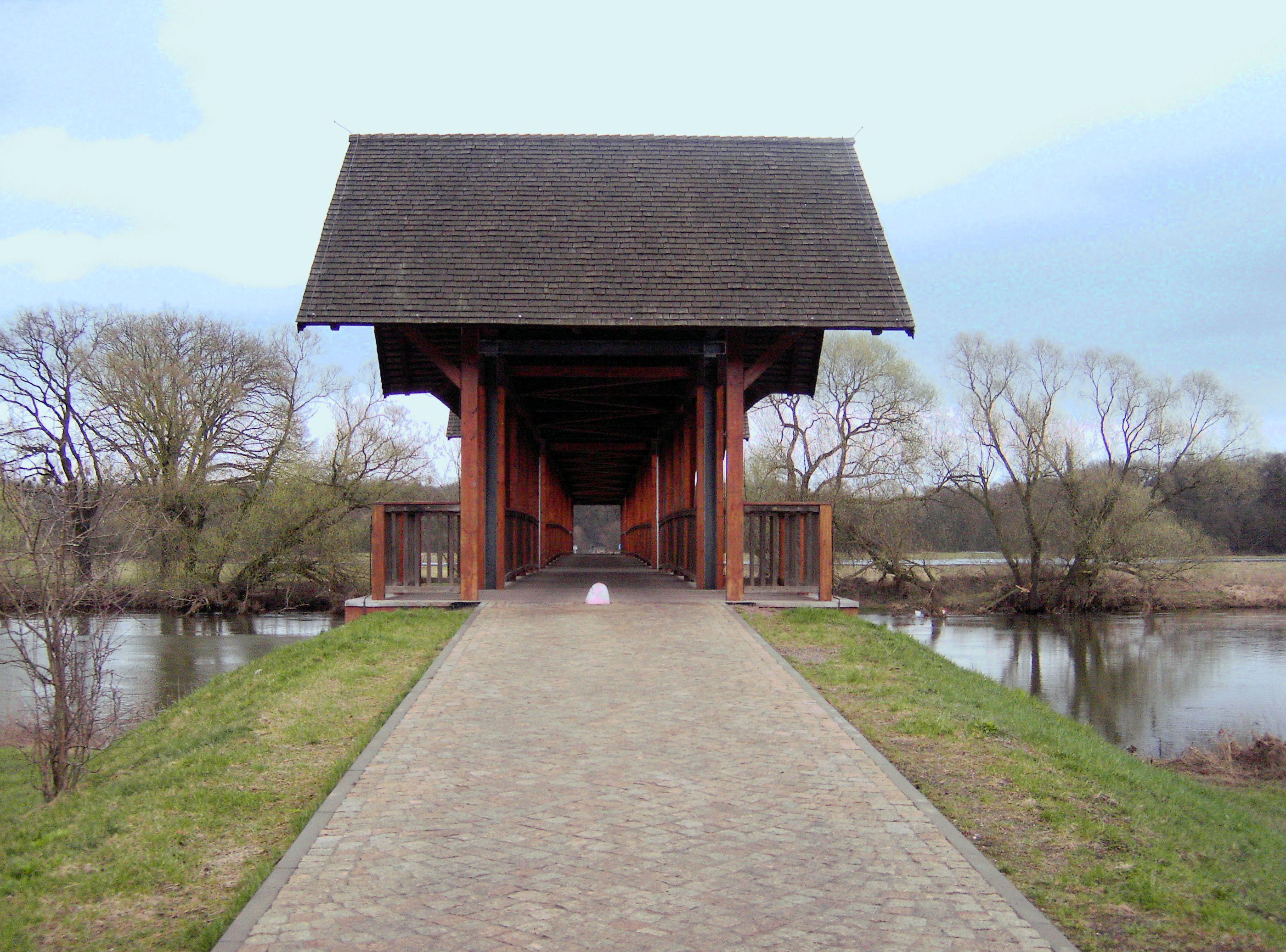 Jagdbrücke über die Mulde bei Dessau, errichtet 1993